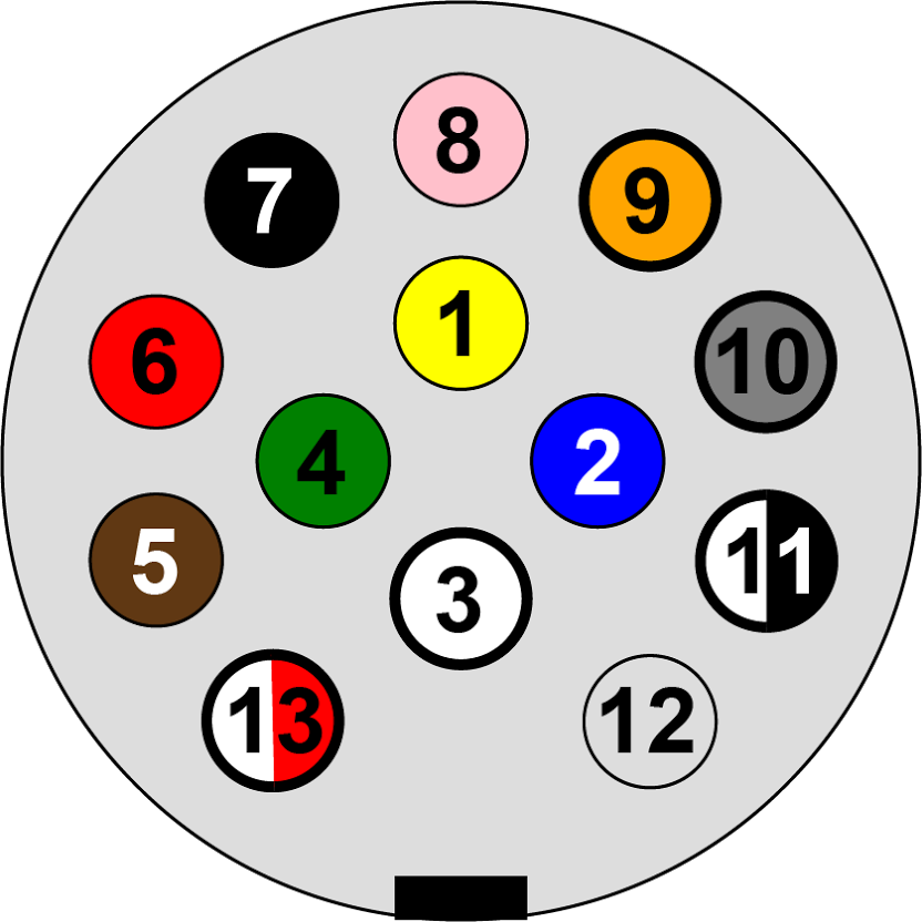 Zapojení konektorů 13. pólové zásuvky přívěsu - pohled do otevřené zásuvky (na vozidle), nebo do zástrčky ze strany zapojení vodičů (na přívěsu)